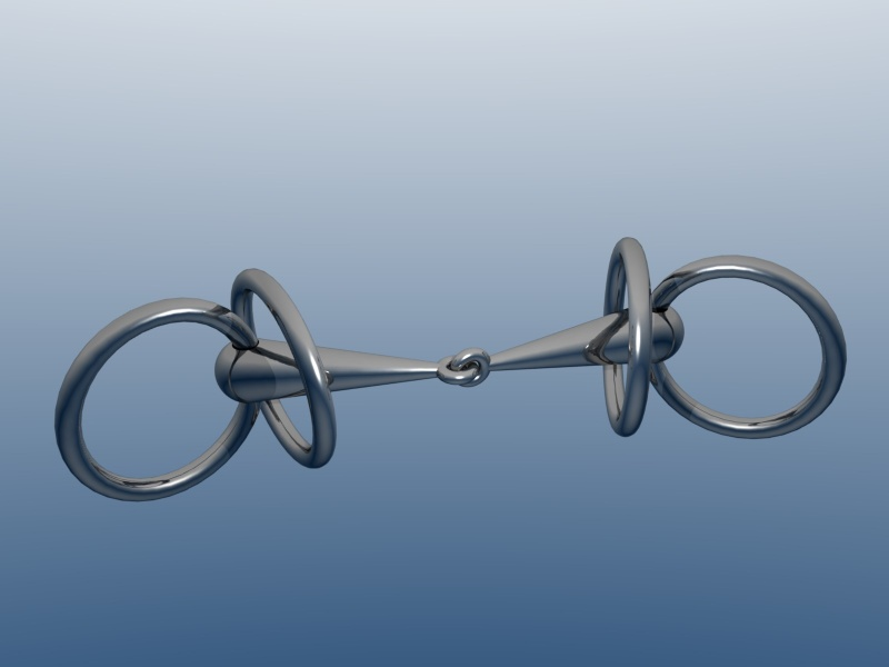 Un mors à 4 anneaux. Les anneaux centraux sont fixés aux montants, les anneaux latéraux aux rênes. Le mors est donc totalement indépendant du bridon. C'est un mors plutôt releveur comme tous les mors brisés à anneaux, les anneaux centraux n'étant là pour que l'action des rênes soient plus précises. Modélisé sous Blender par LardonCru.